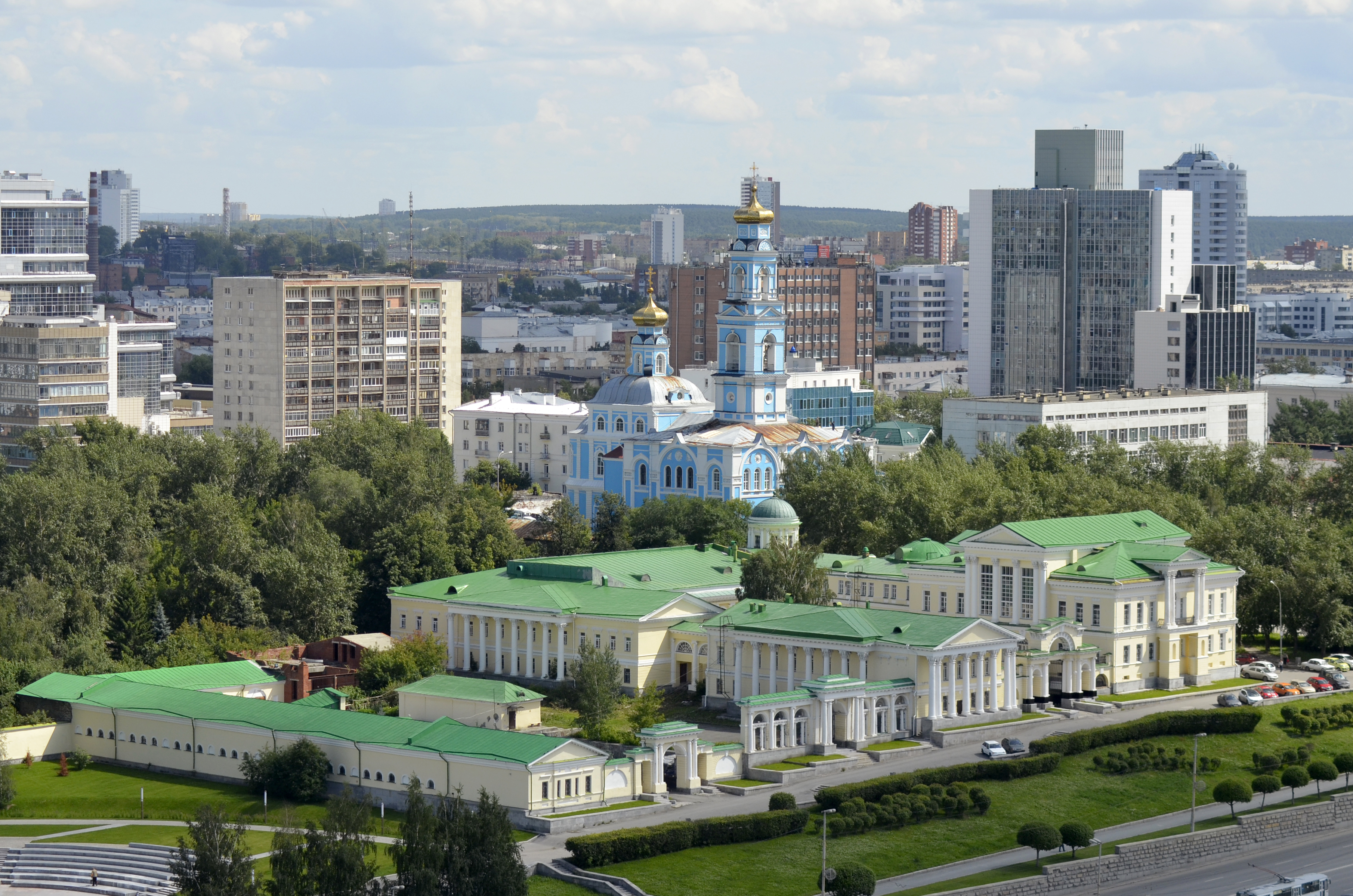 Усадьба Расторгуева Л.И.- Харитонова П.: улица Карла Либкнехта, 44, Екатеринбург, Свердловская область